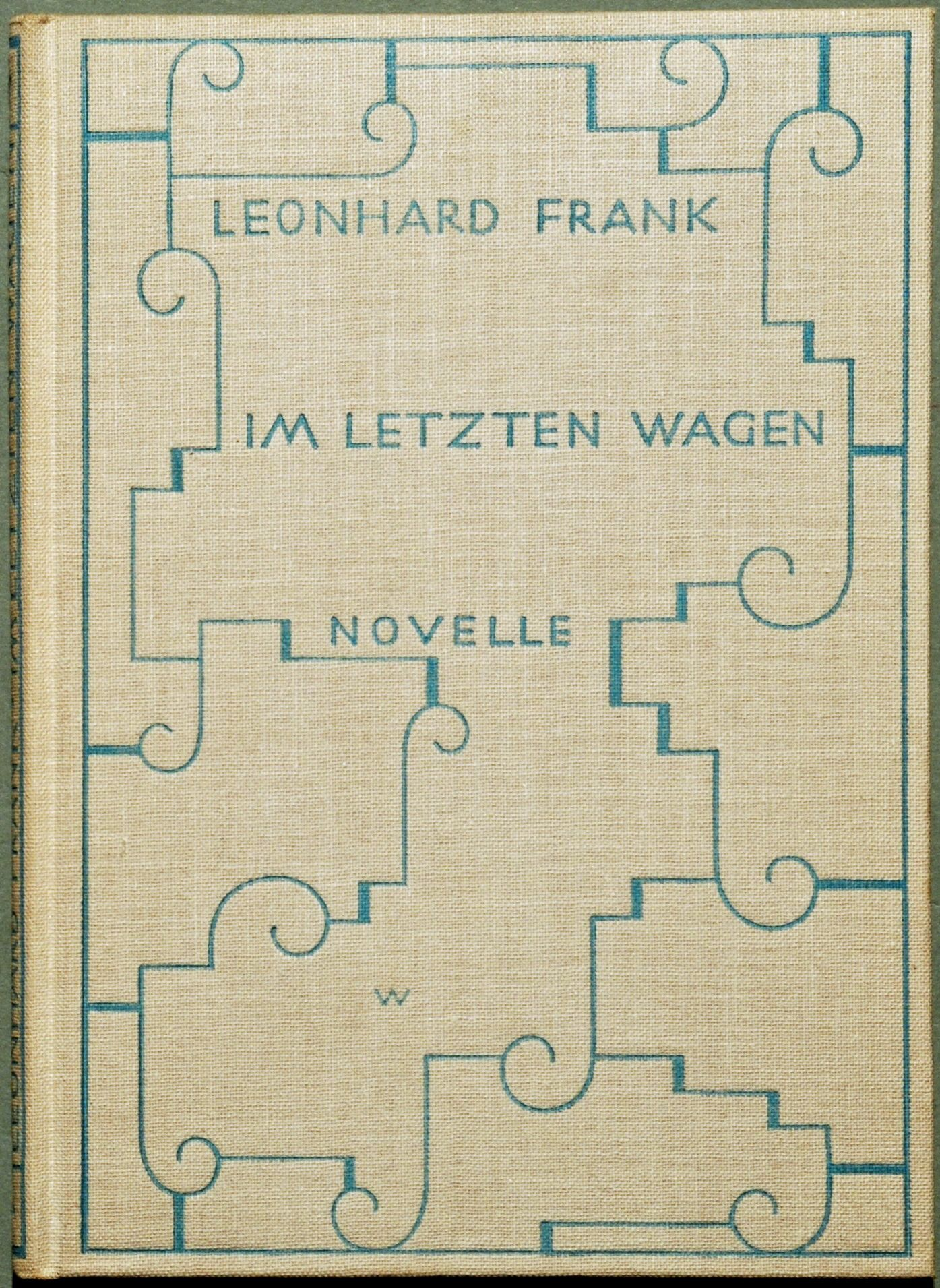 Frank, Leonhard: Im Letzten Wagen. Novelle. Verlagseinband des Erstausgabe.